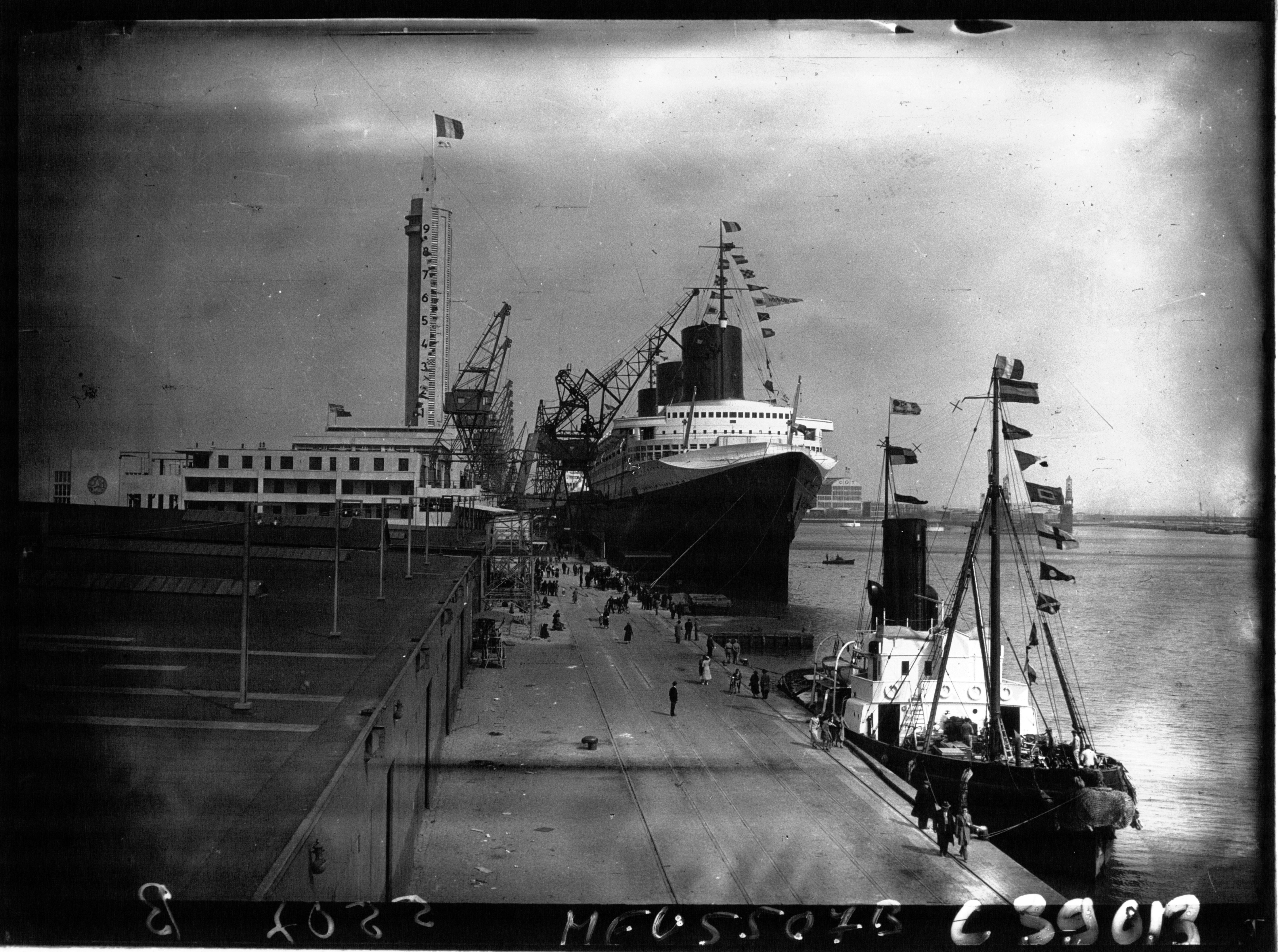 Le Normandie est à quai avec le grand pavois le jour de son inauguration